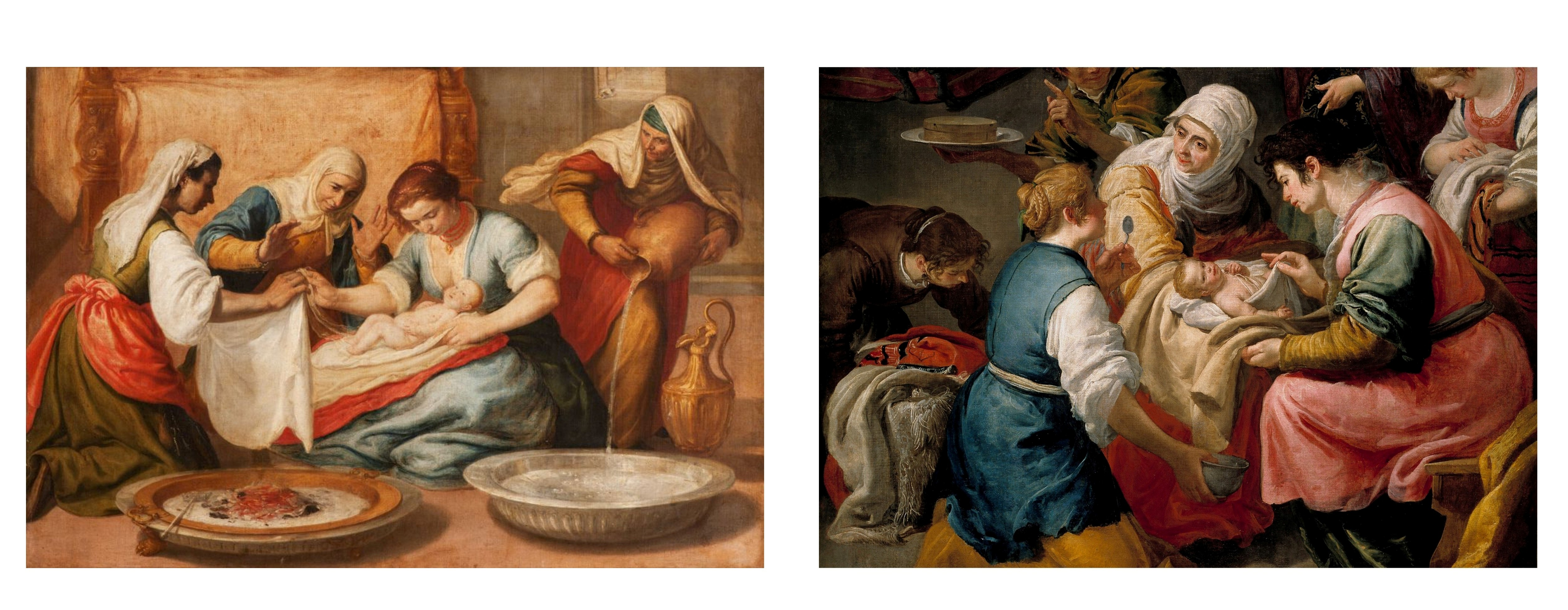 nacimiento de la virgen Espana, siglo XVII, y Jusepe Leonardo, ca 1642